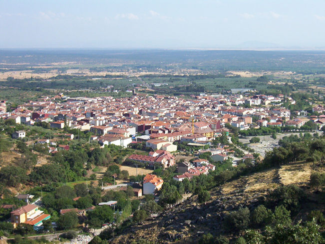 Vista del pueblo de Candeleda, en Ávila (España)